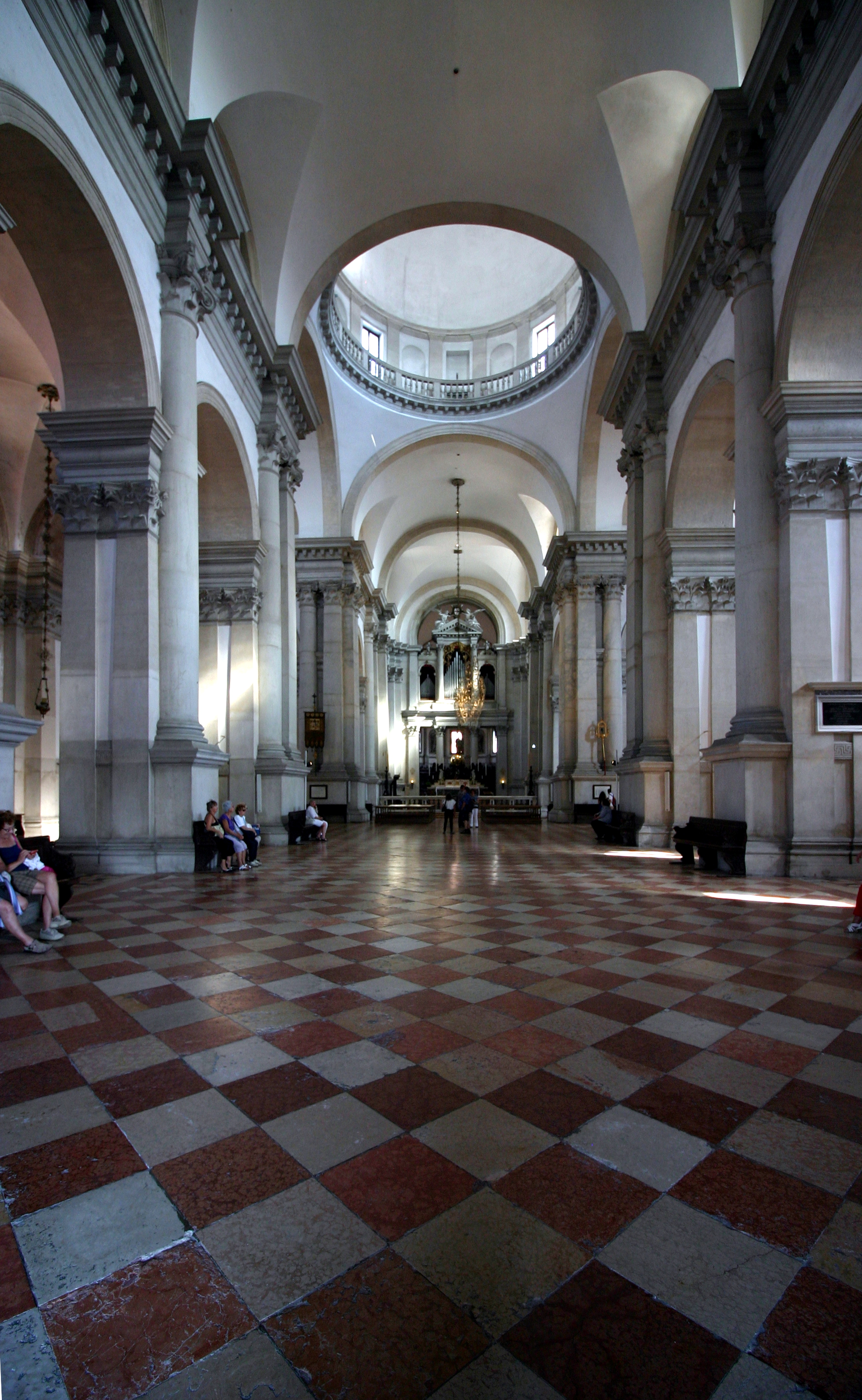 San Giorgio Maggiore - Venice